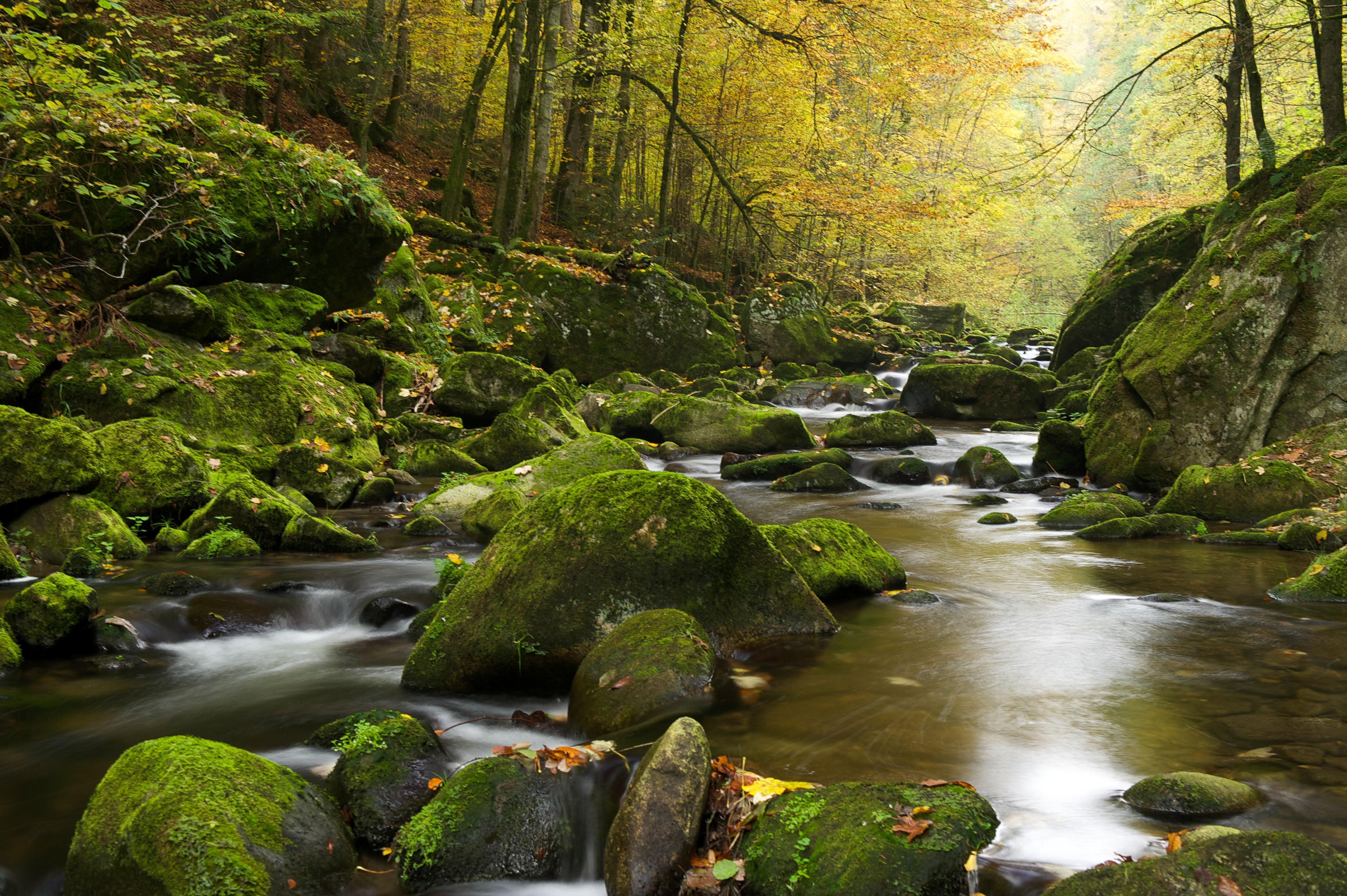 Wildbachklamm Niederbayen, ( LSG 00096.01 )